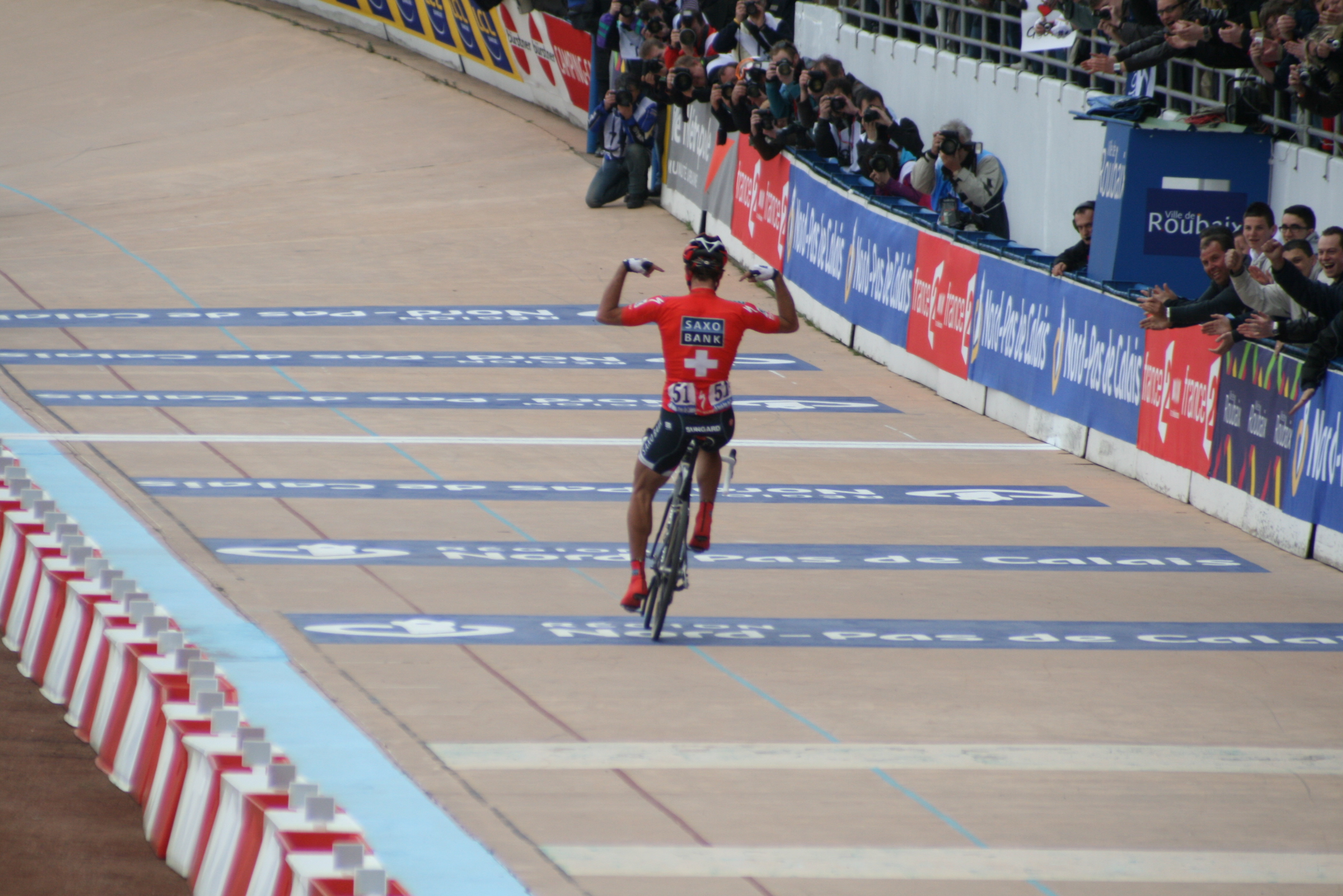 Fabian Cancellara, à l'arrivée de Paris-Roubaix 2010